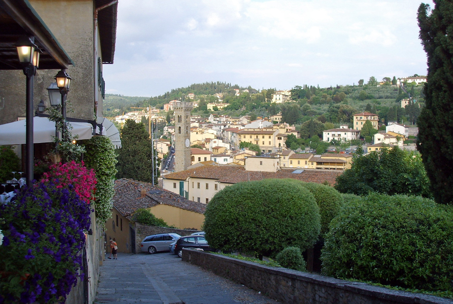 Via di san francesco, vista